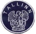 Noorte Kotkaste Tallinna maleva embleem